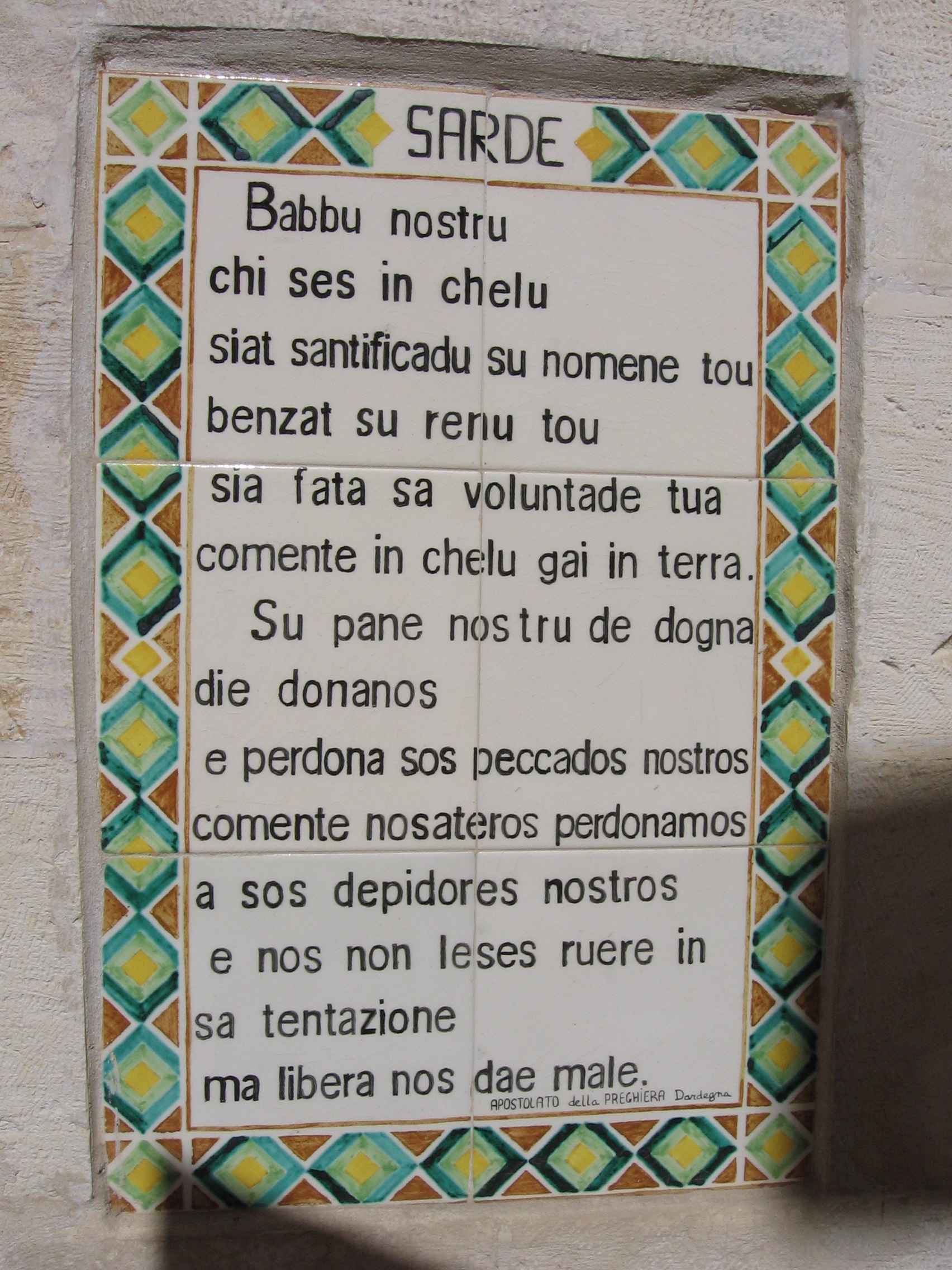 Chiesa del Padre Nostro, a Gerusalemme. Preghiera in sardo